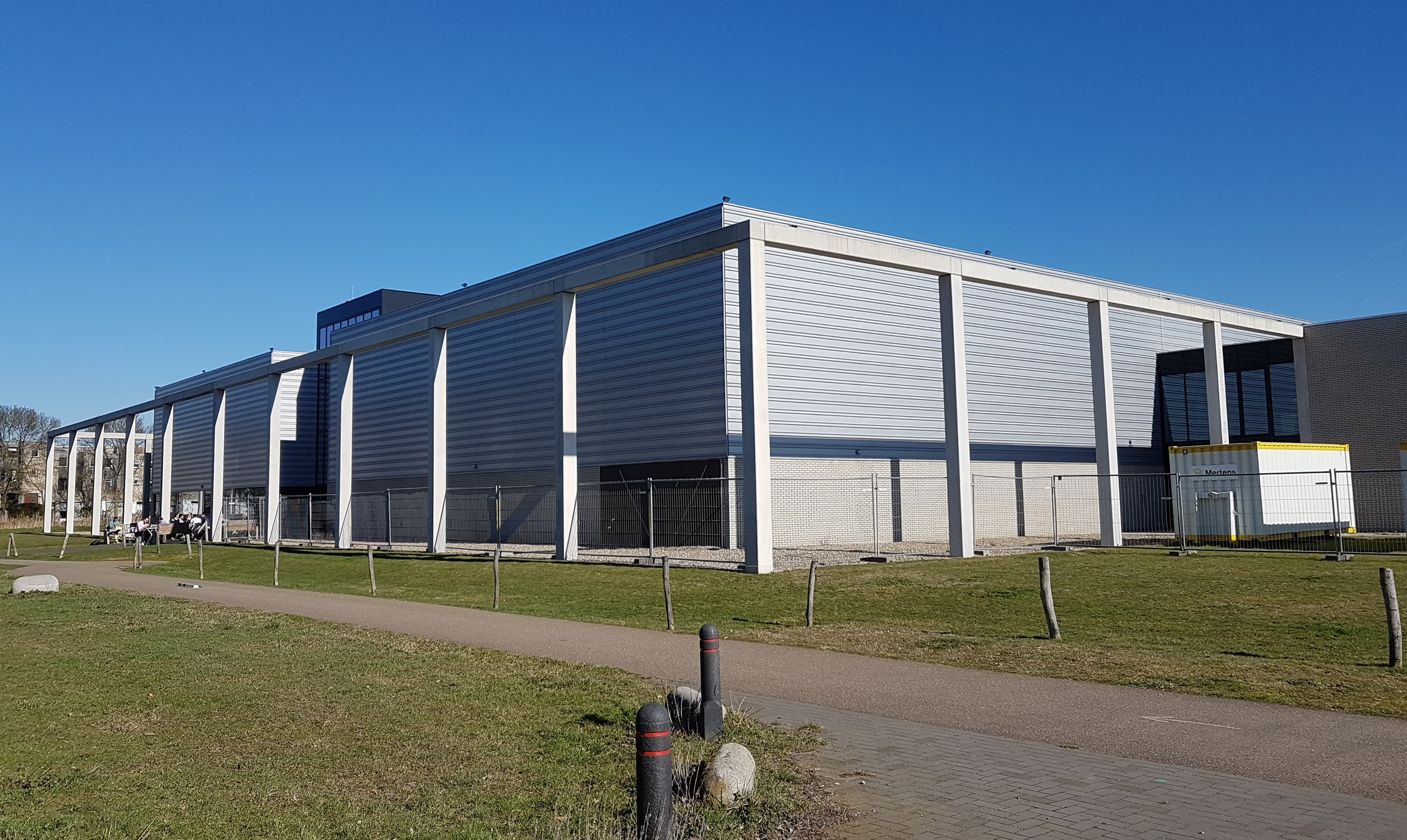 Zicht uit het zuidwesten op het Universitair Sportcentrum in Randwyck in Zuidoost-Maastricht.